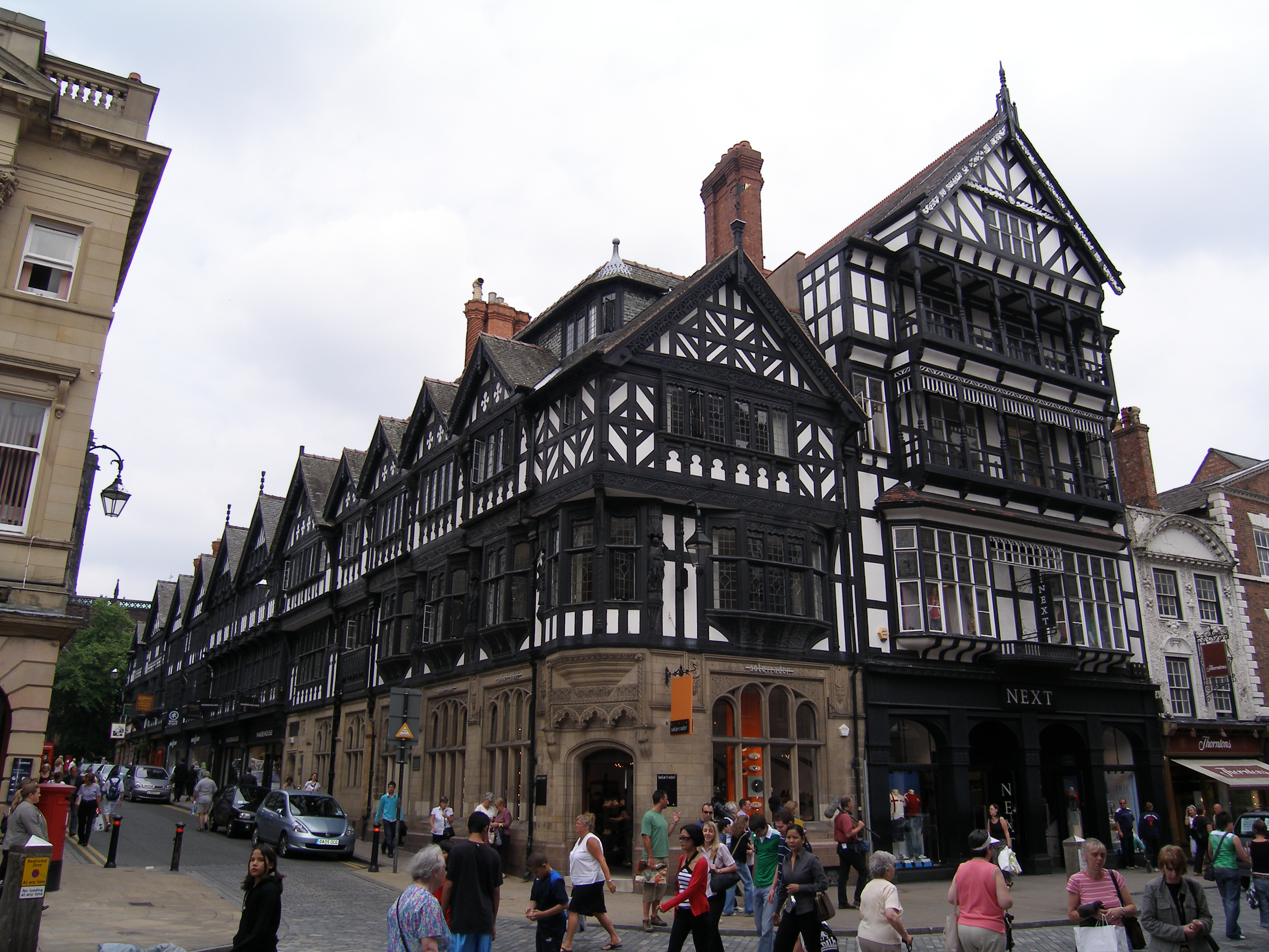 een mooi rijtje vakwerkhuizen.